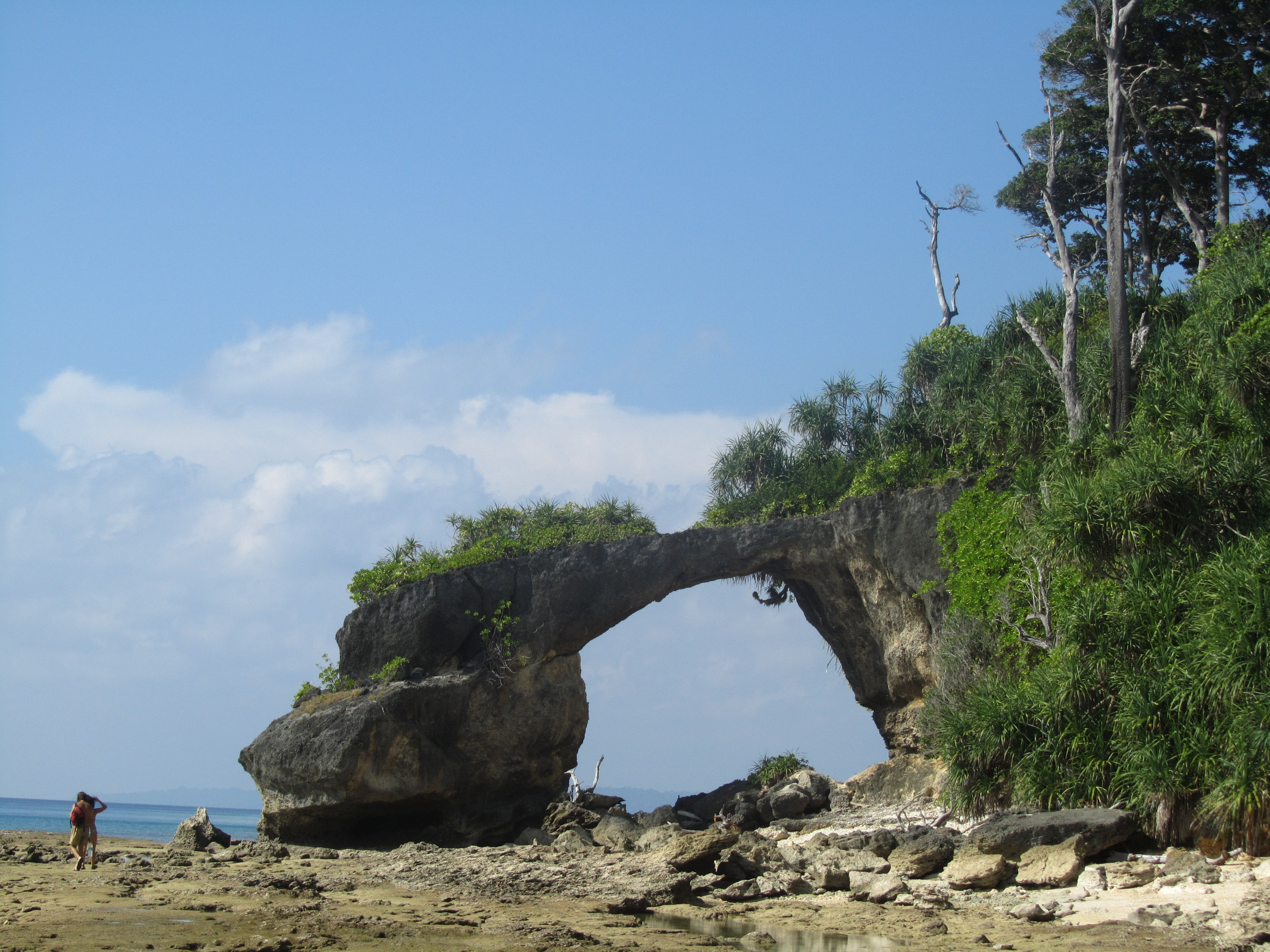 קשת תוצרת של בליה חופית